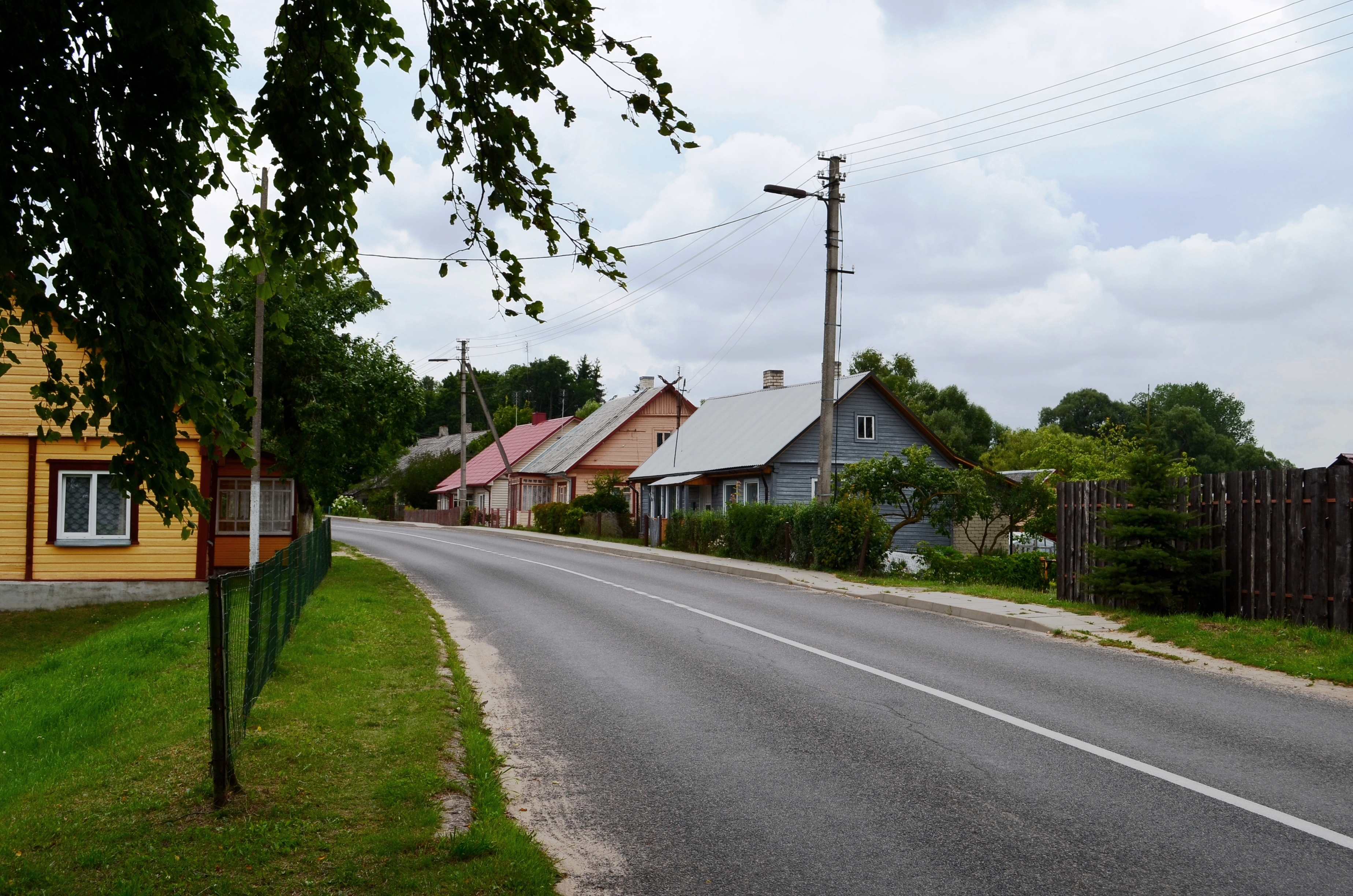 Vilniaus g., Giedraičiai, Molėtų r.